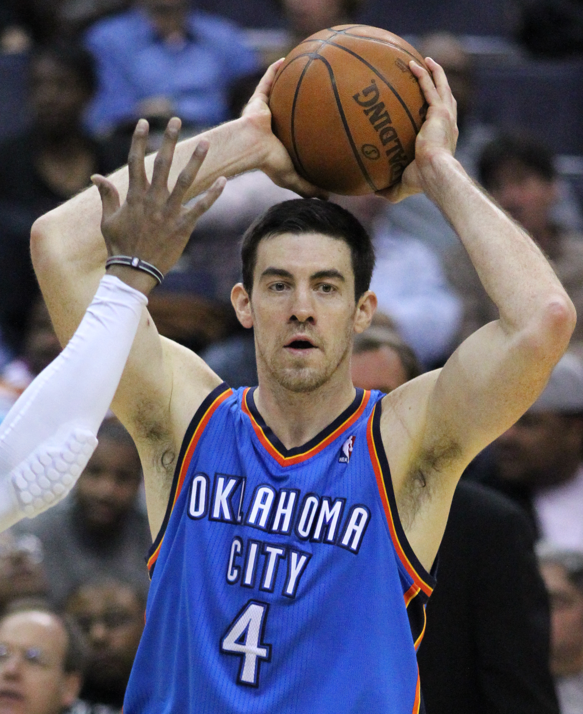 Wizards v/s Thunder 03/14/11